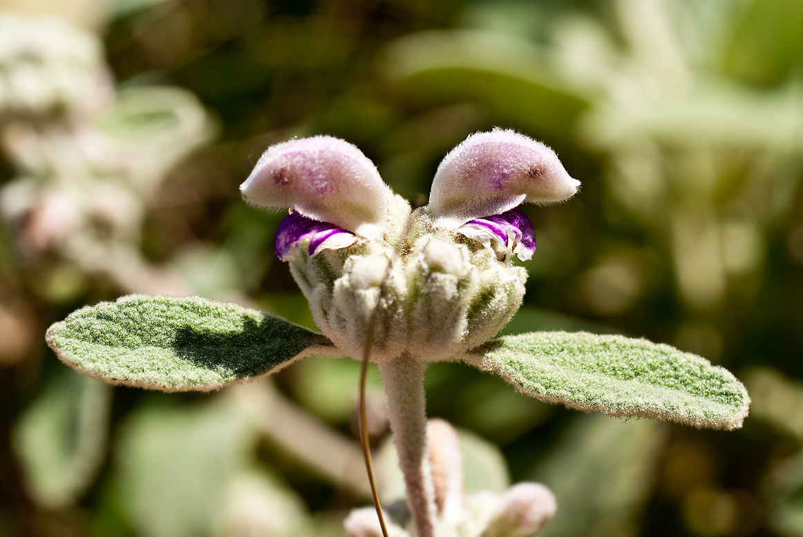 Planta de la familia de las labiadas. Endémica de Mallorca y Menorca